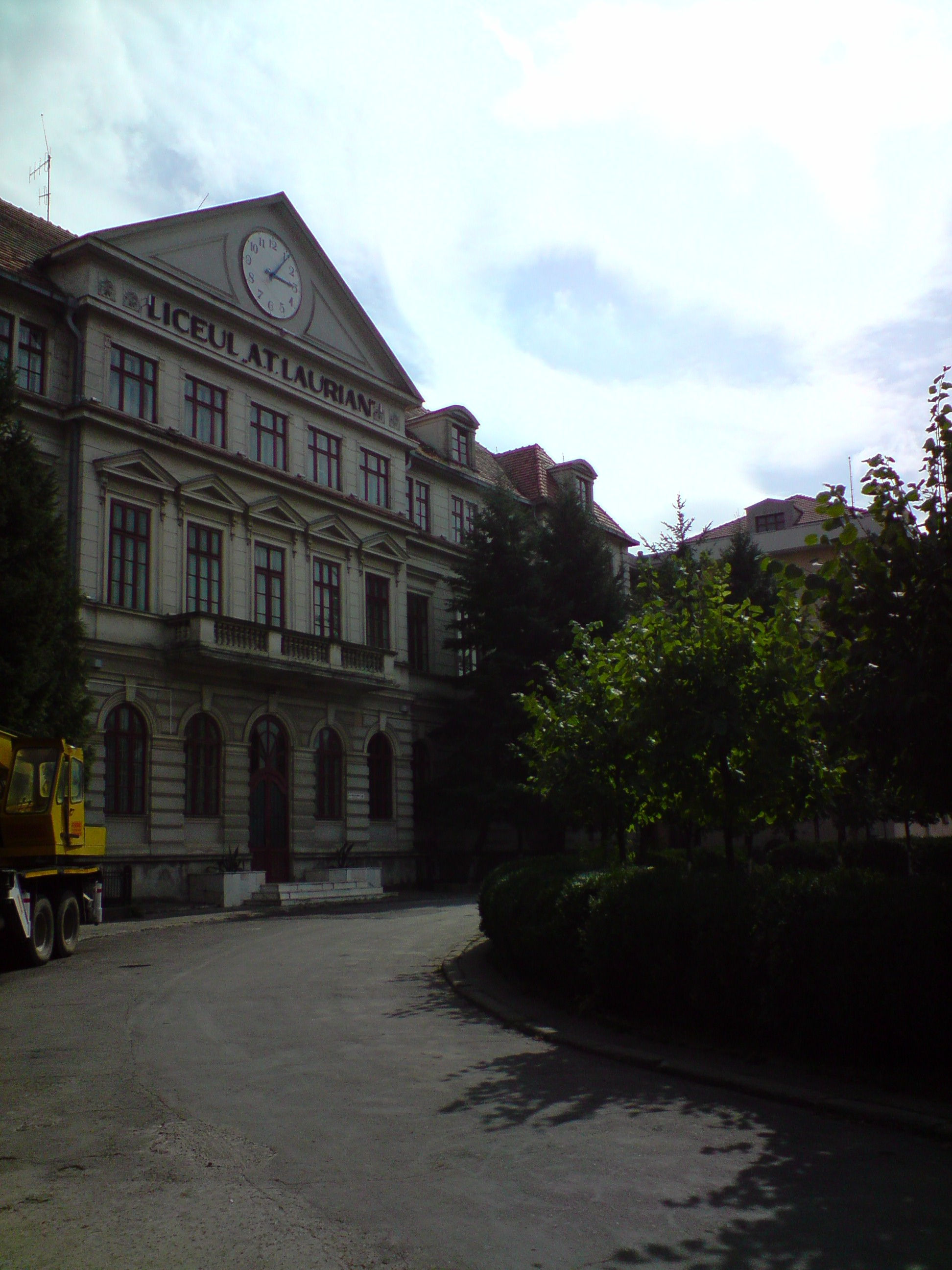 Liceul Teoretic August Triboniu Laurian